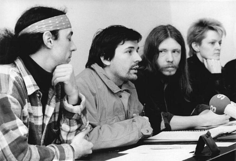 Berlin, Pressekonferenz Totalverweigerer ADN-ZB Oberst 17.1.90 Berlin: Totalverweigerer- Auf einer Pressekonferenz stellten sich "Totalverweigerer des Wehrdienstes" aus Ost und West den Fragen der Medienvertreter. Die Gruppierung sieht die Wehrpflicht als eine wesentliche Bedingung der derzeitigen Organisation des Unvernünftigen an und tritt für dessen absolute Eliminierung ein. (v.l.n.r.: Christian Herz, Sprecher aus Berlin (West), Gerhard Scherer, Berlin (West), Michael Frenzel, Berlin, Renate Kühnast, Alternative Liste, Berlin (West).